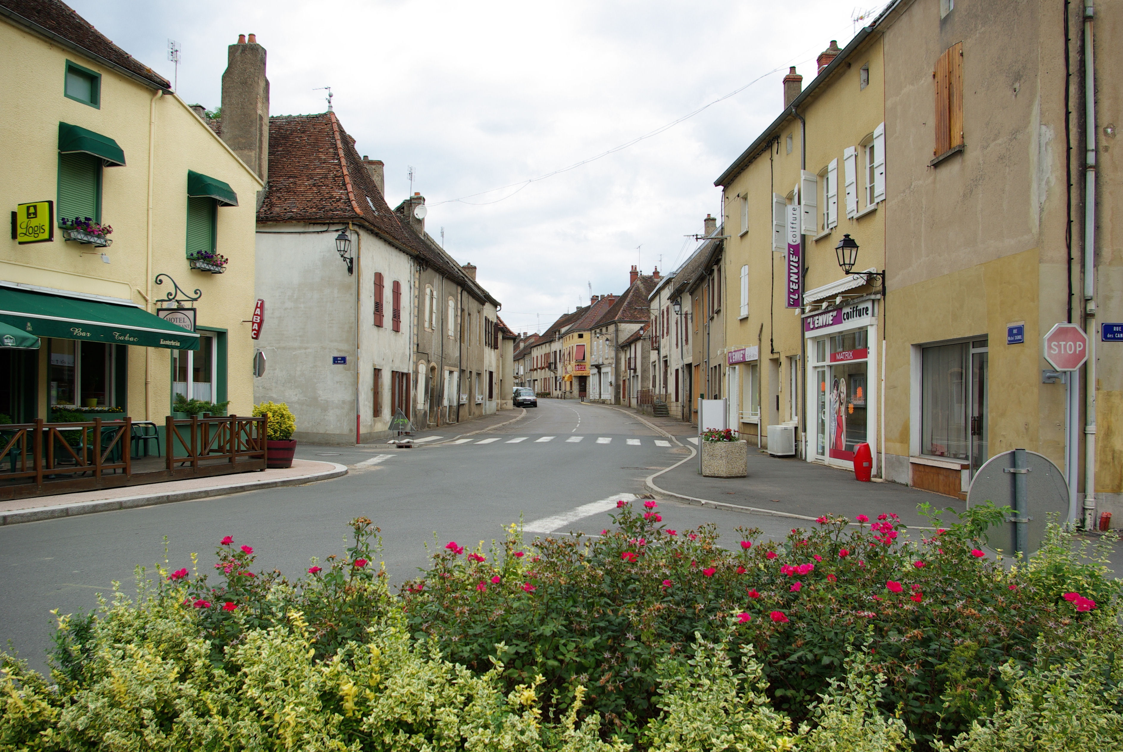 Rue principale de Joncy, Saône-et-Loire (France). Photo de Philippe Burette.